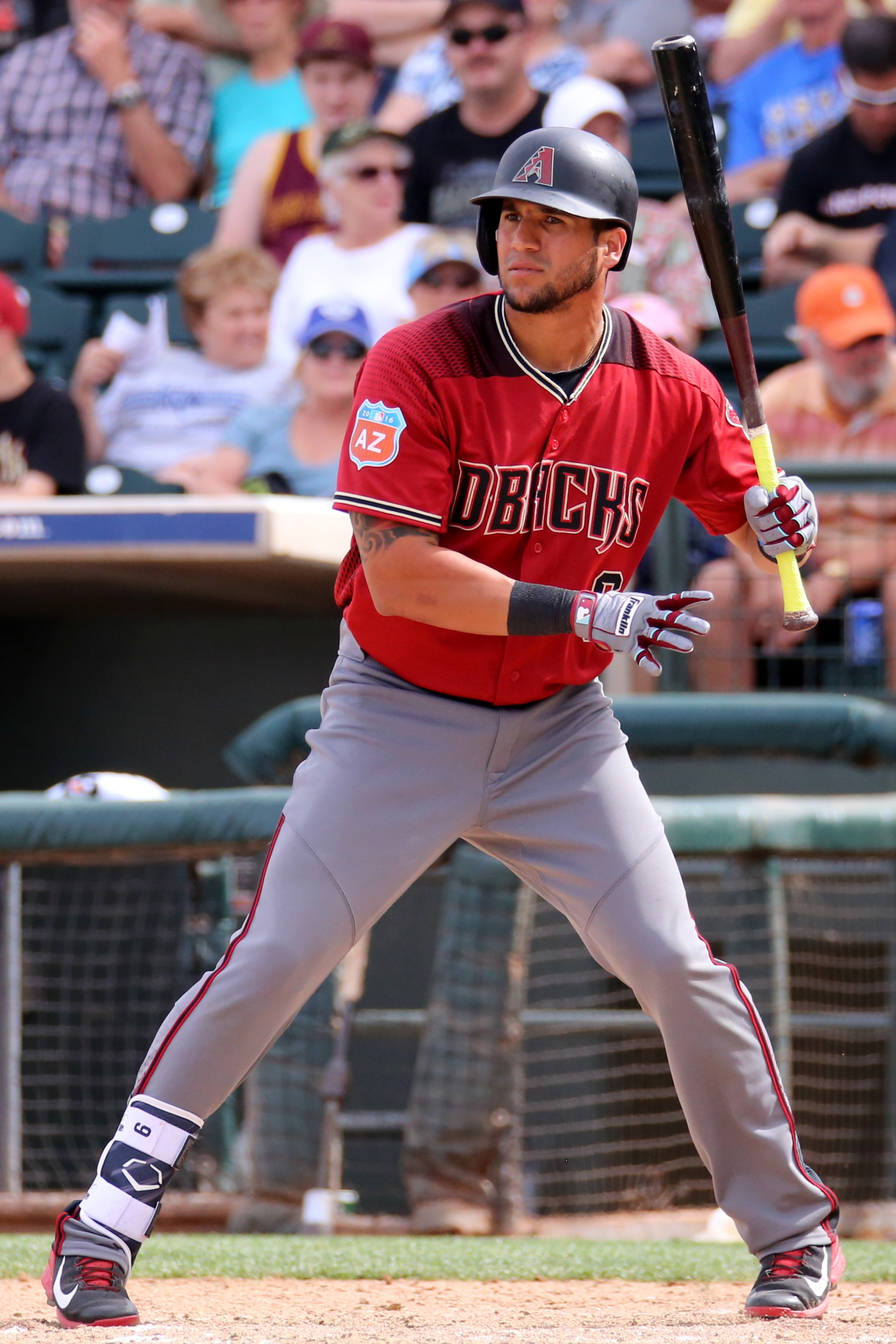 David Peralta